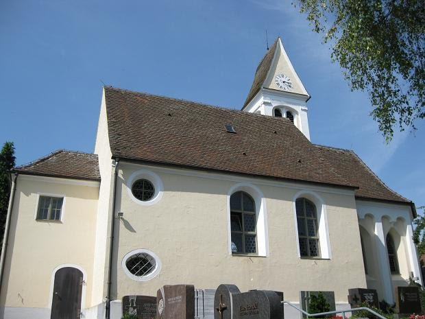 Arlesried Kirche